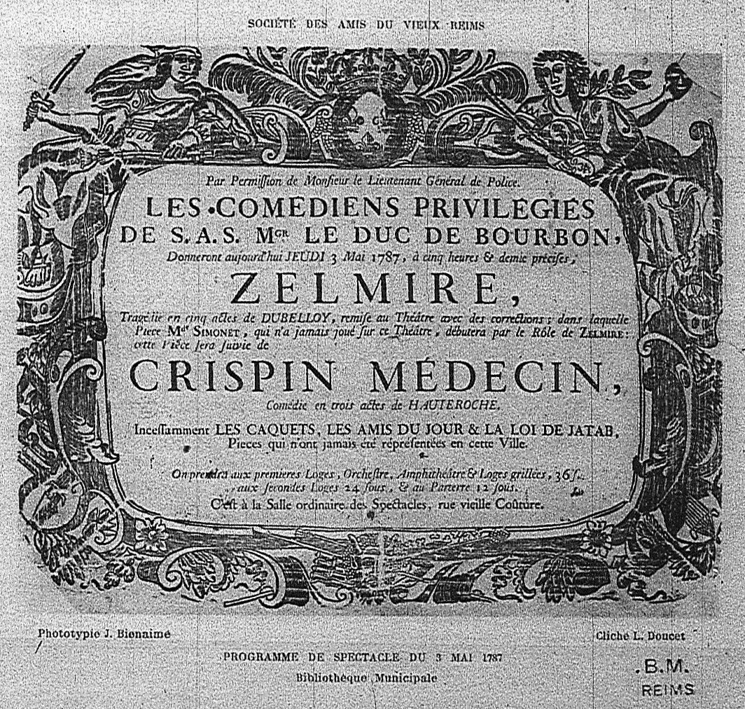 pour l'exposition à Reims.